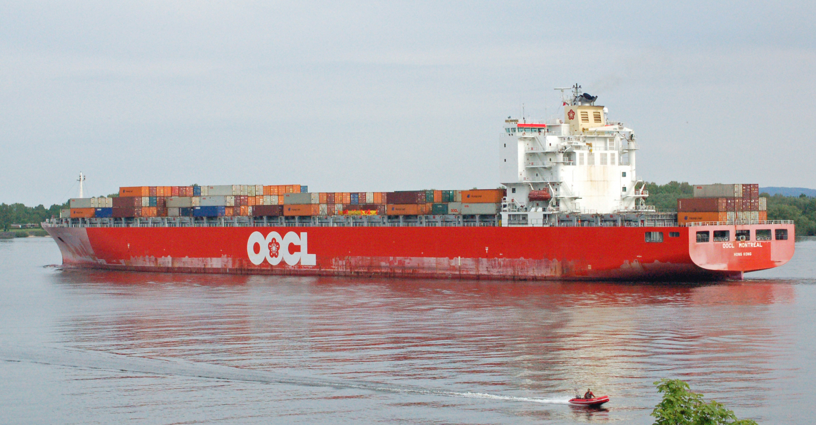 Das Frachtschiff OOCL Montreal auf der Elbe bei Wedel IMO-Nummer: 9253739 MMSI-Nummer: 477321000 Rufzeichen: VRYO3 Länge: 294.0m Breite: 32.0m Flagge: Hong Kong